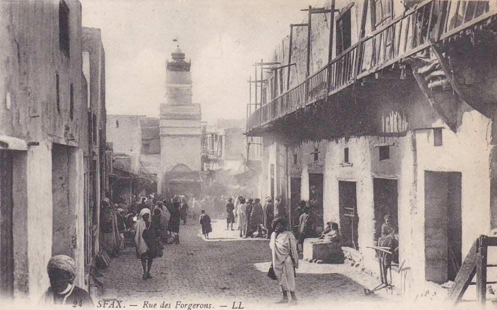 Souk El Haddadine in Sfax